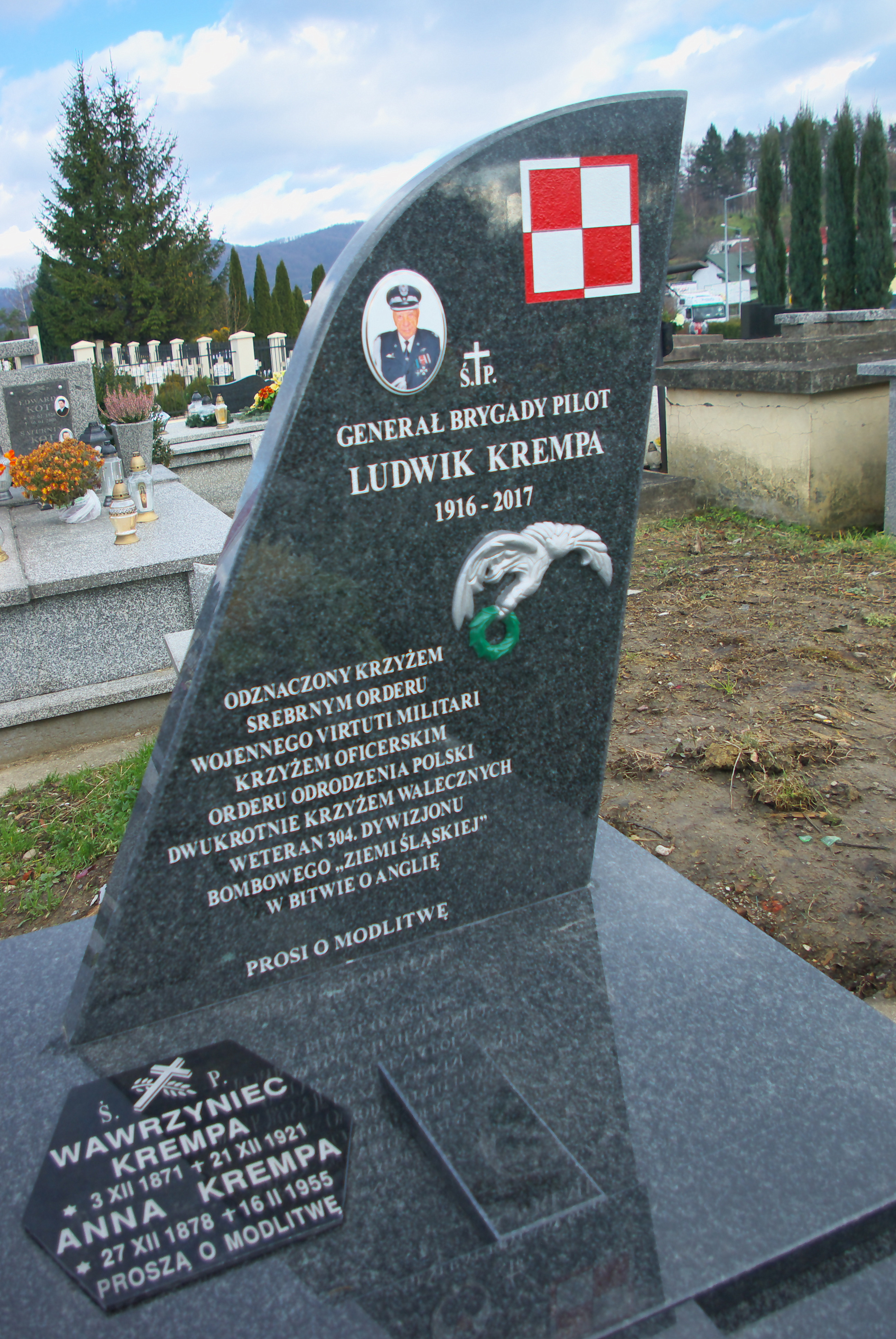 Nagrobek gen. bryg. pil. Ludwika Krempy i jego rodziców Wawrzyńca i Anny na Cmentarzu Centralnym w Sanoku.